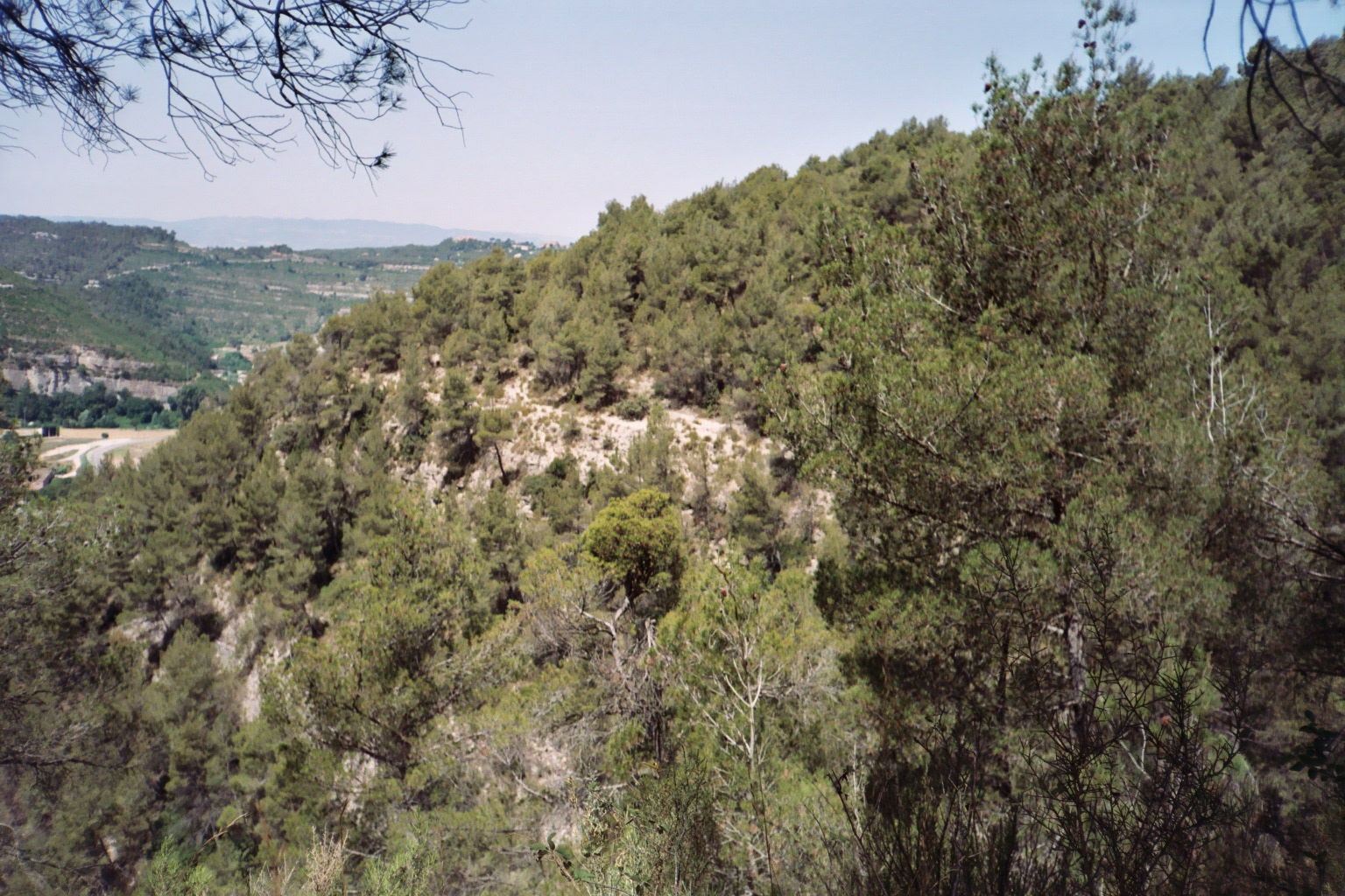 La Cinglera de la Rovira (Monistrol de Calders, Moianès)